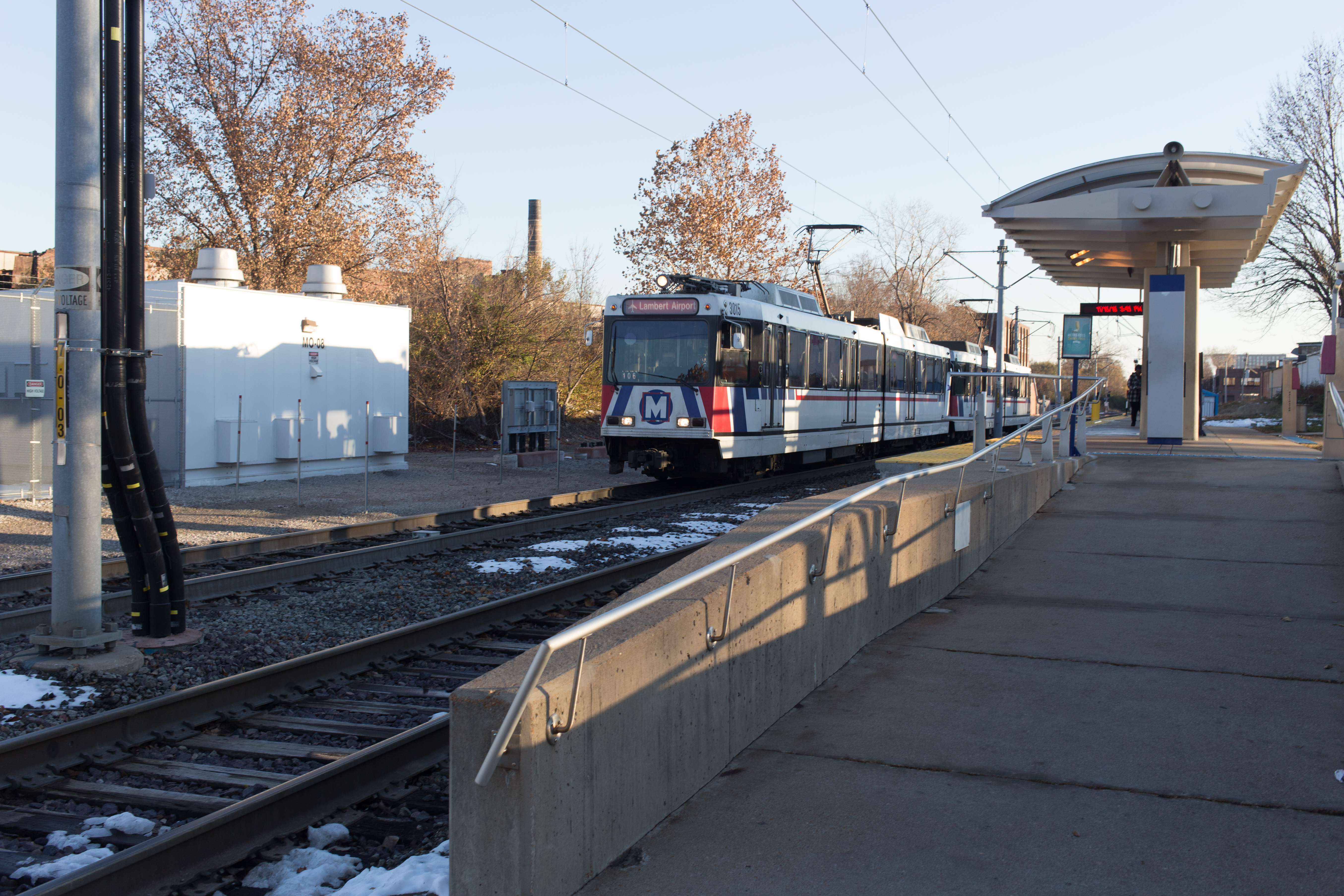 Wellston Metrolink